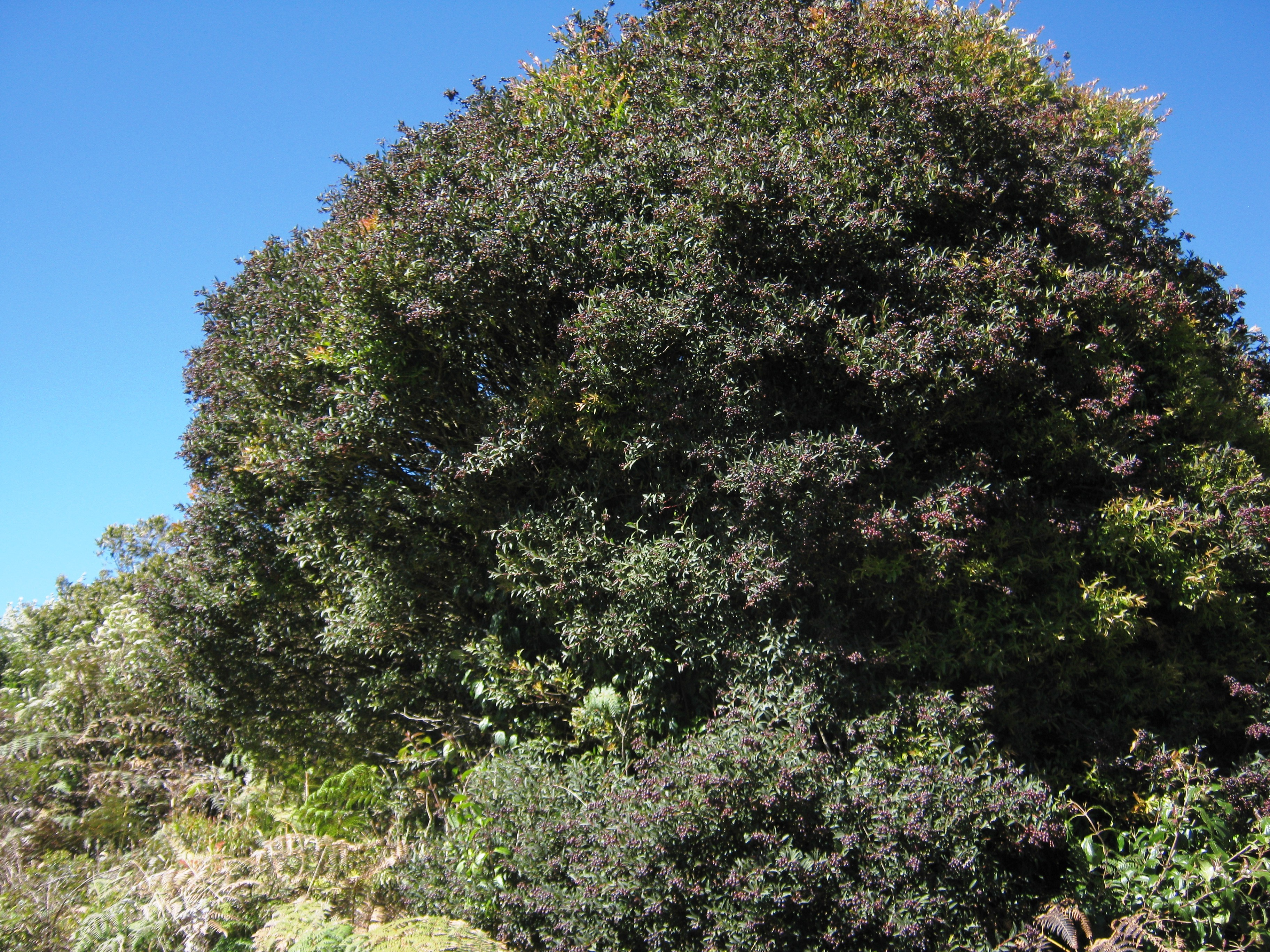 Fotos tomadas en trinidad, Dota